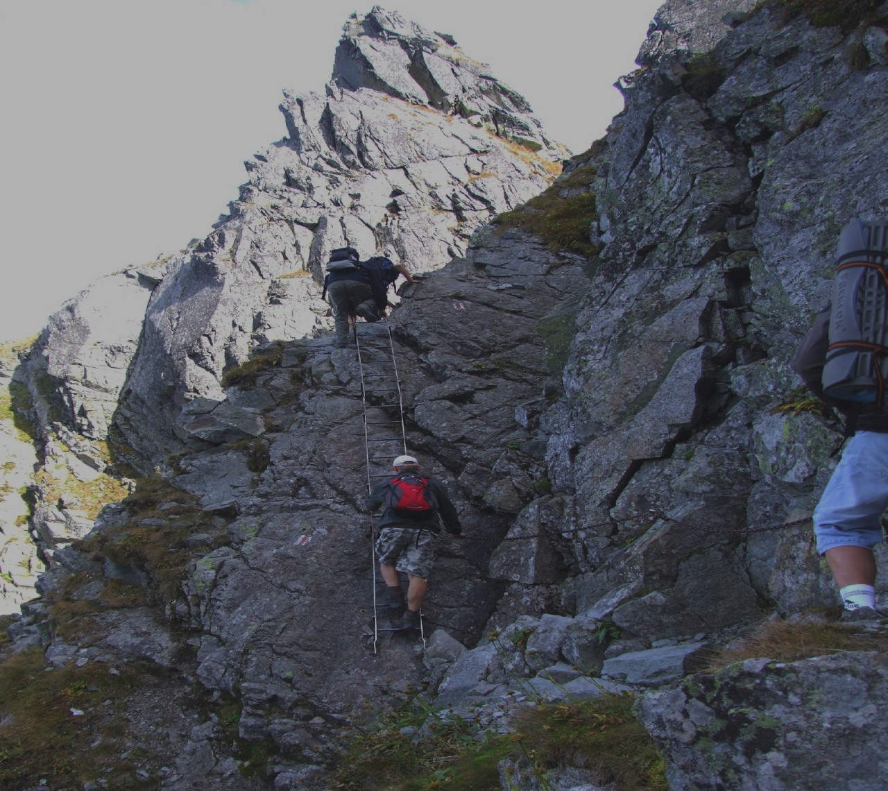 Drabinka przed Orlą Przełączką Niżnią na Orlej Perci